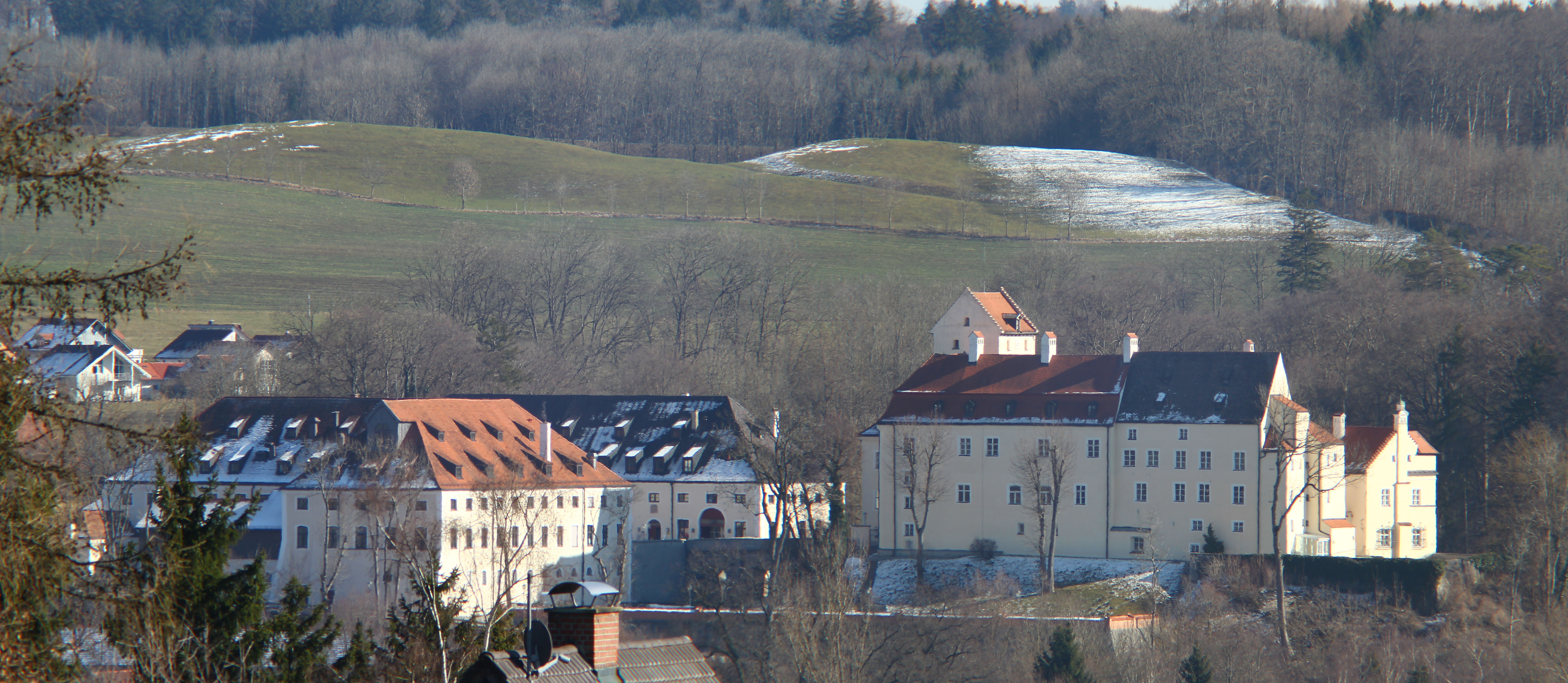 Schloss Seefeld von Hechendorf aus fotografiert